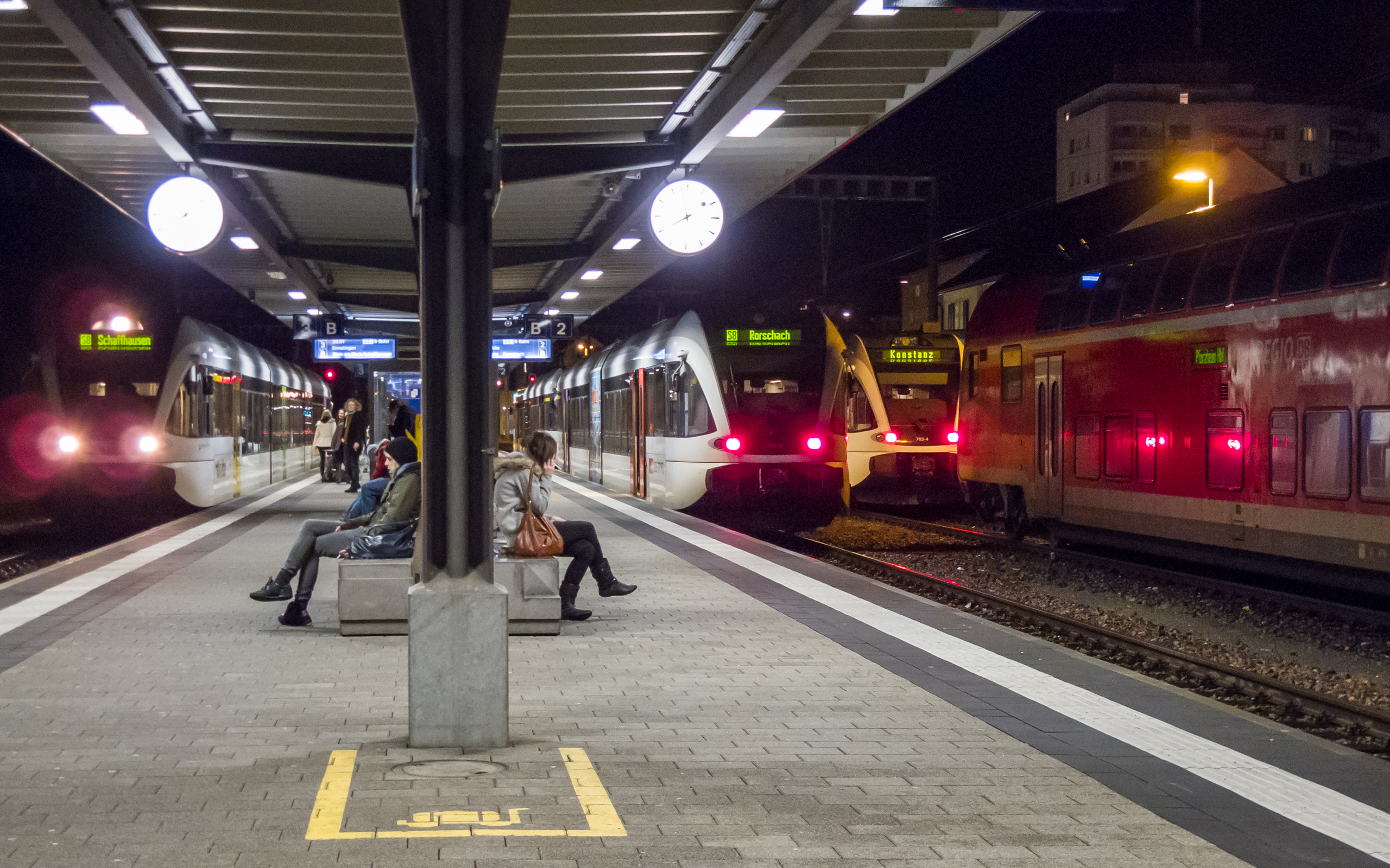 Schwer was los am 13.01.2011 gegen 20 Uhr: 3 THURBO-GTW und ein DB-IRE im Bahnhof Kreuzlingen